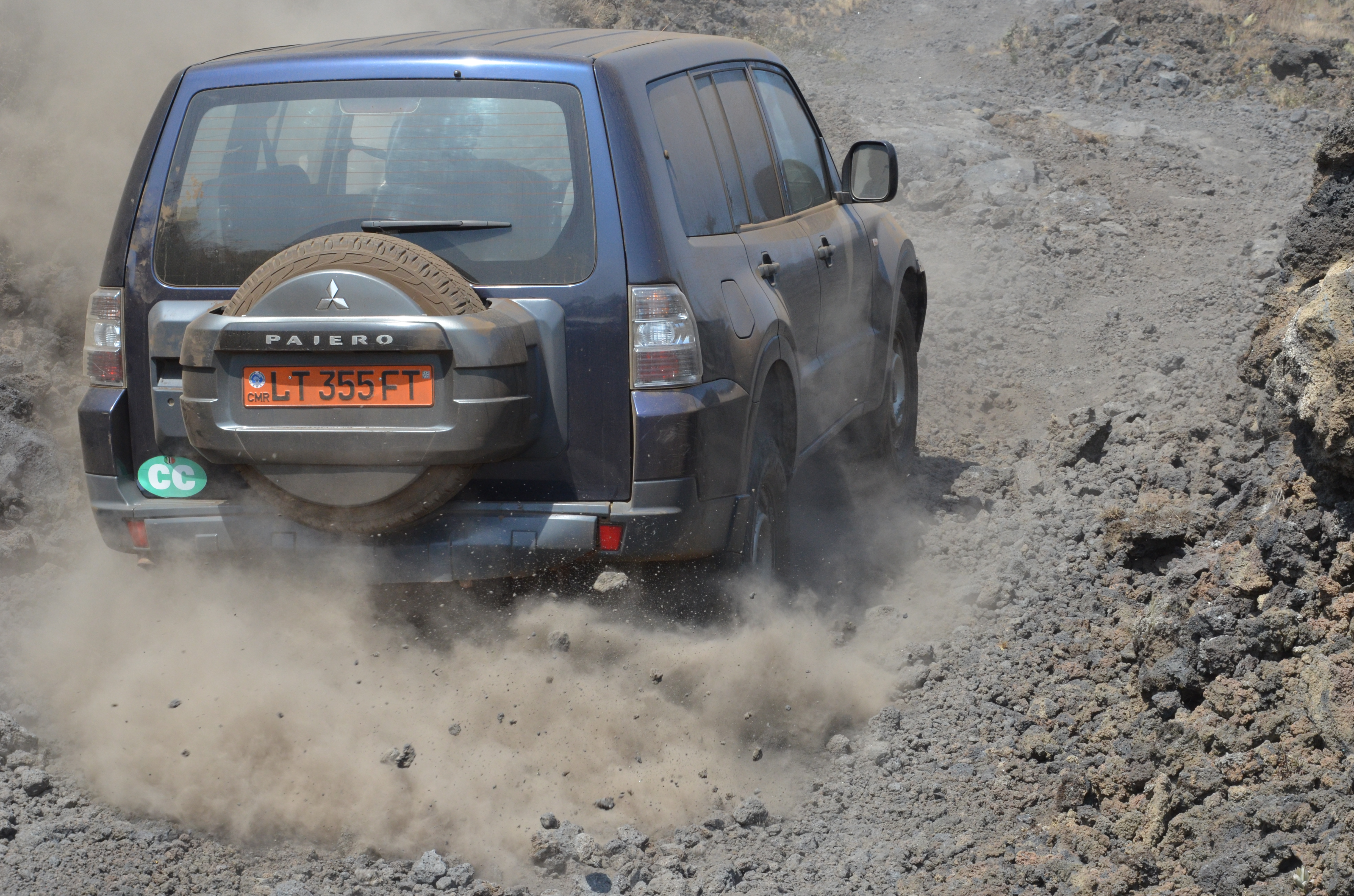 Voiture arpentant le Mont Cameroun